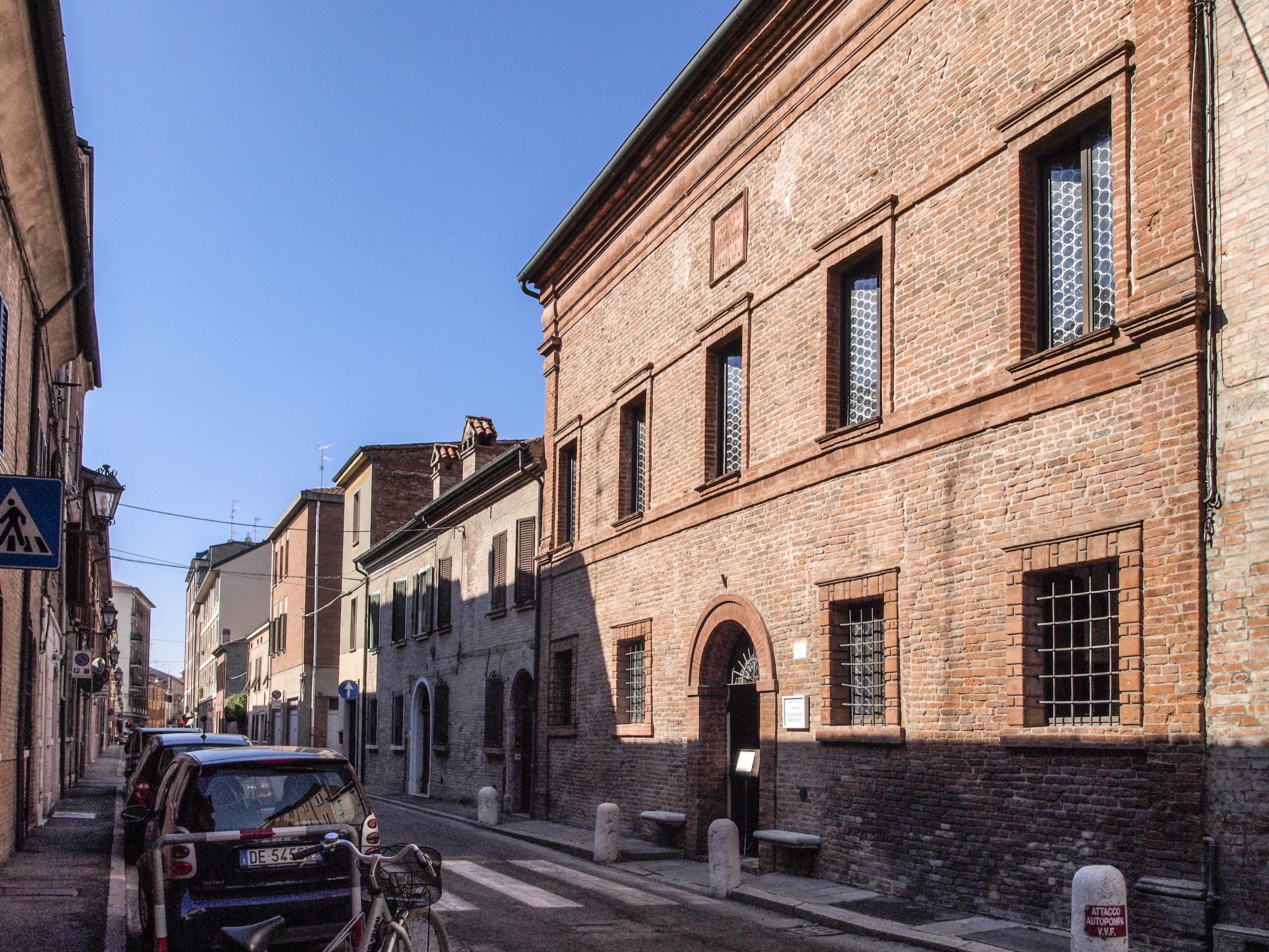 Casa di Ludovico Ariosto This is a photo of a monument which is part of cultural heritage of Italy.